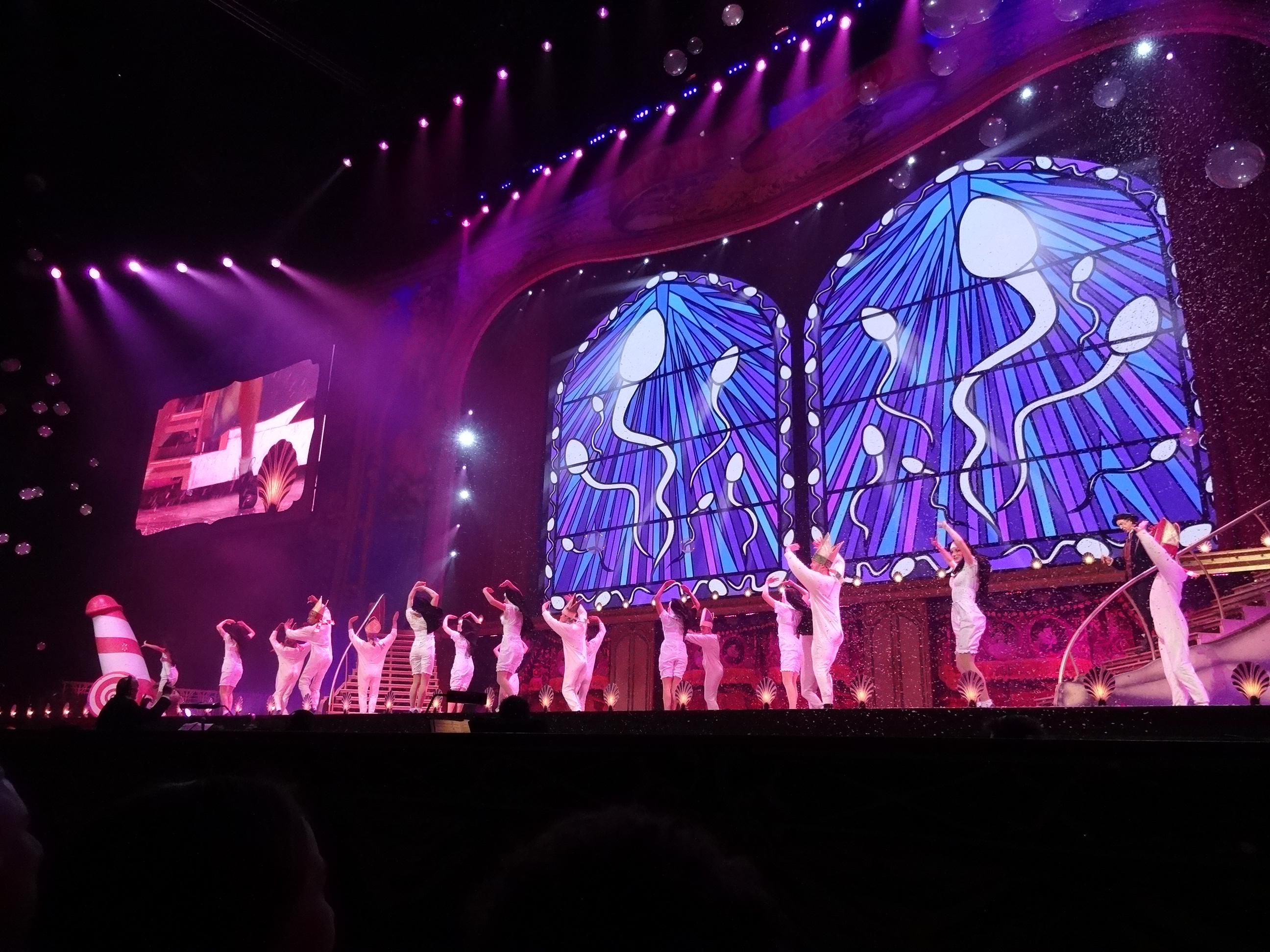 Photo 02-07-14 11 09 02